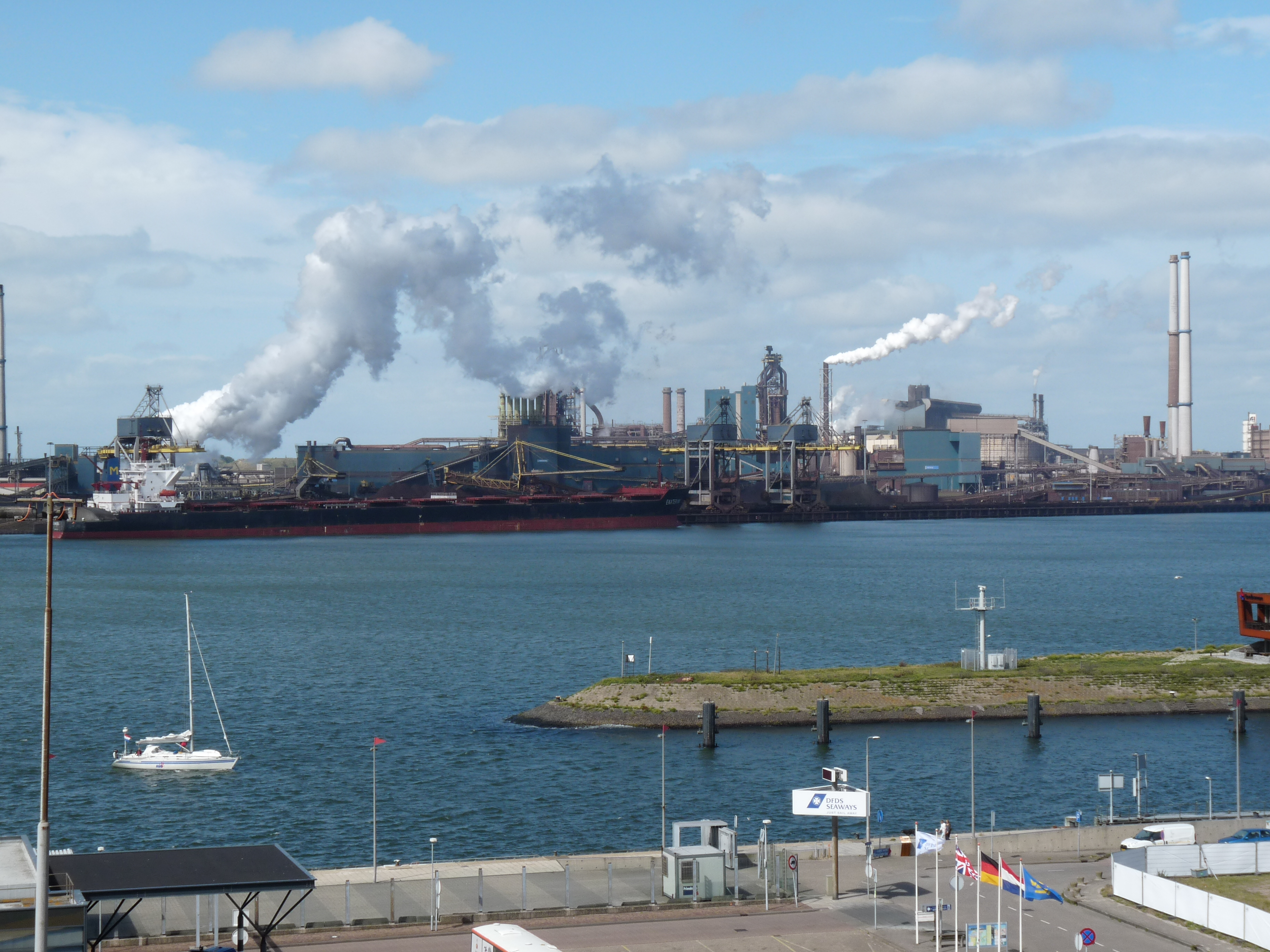 De hoogovens bij Beverwijk gezien vanaf IJmuiden